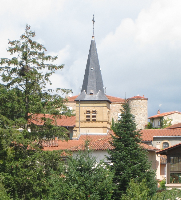 Vue de Jas (Loire (42) - France)